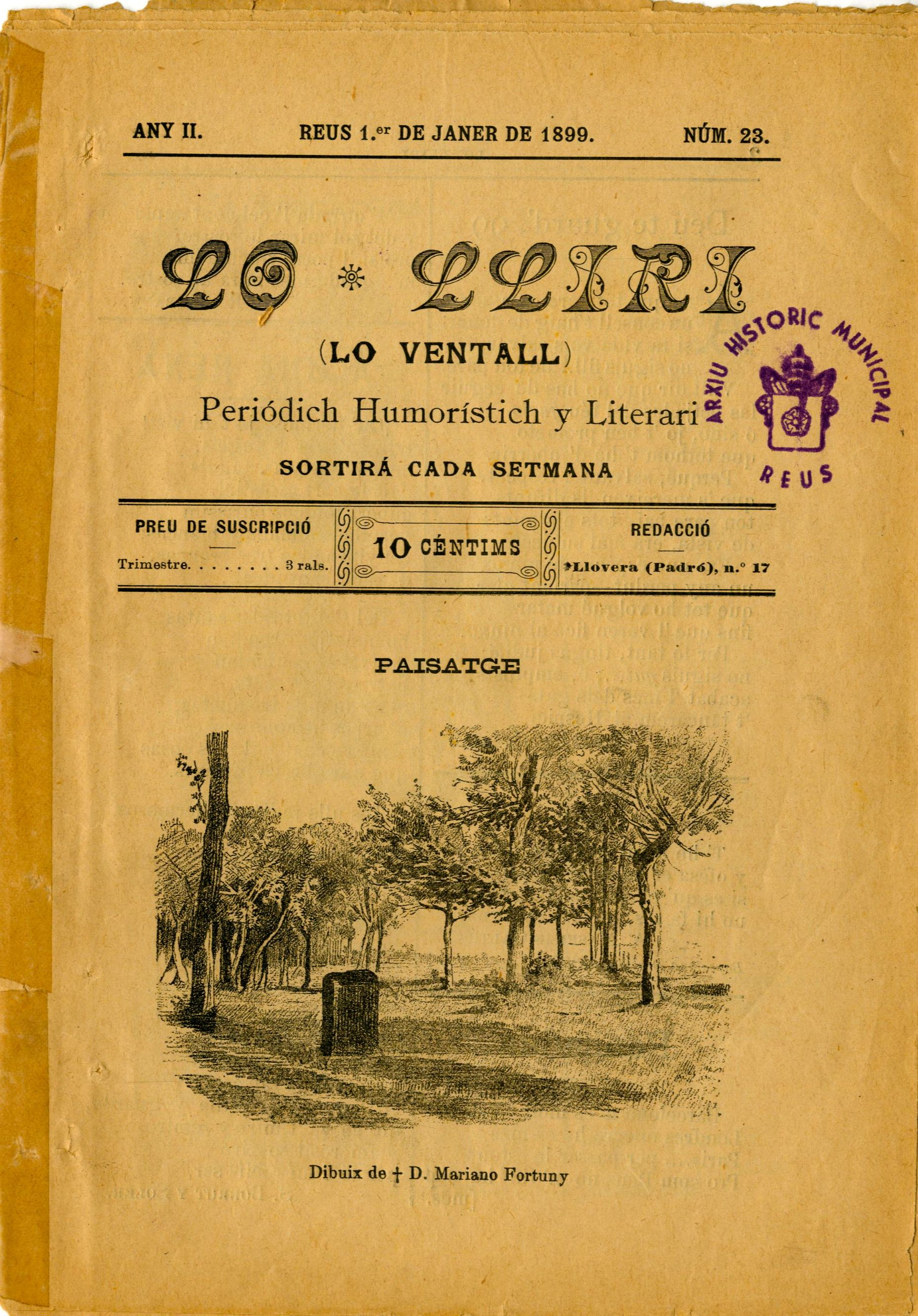 Primera pàgina de Lo Lliri (Lo Ventall) Any II núm. 23. 1899